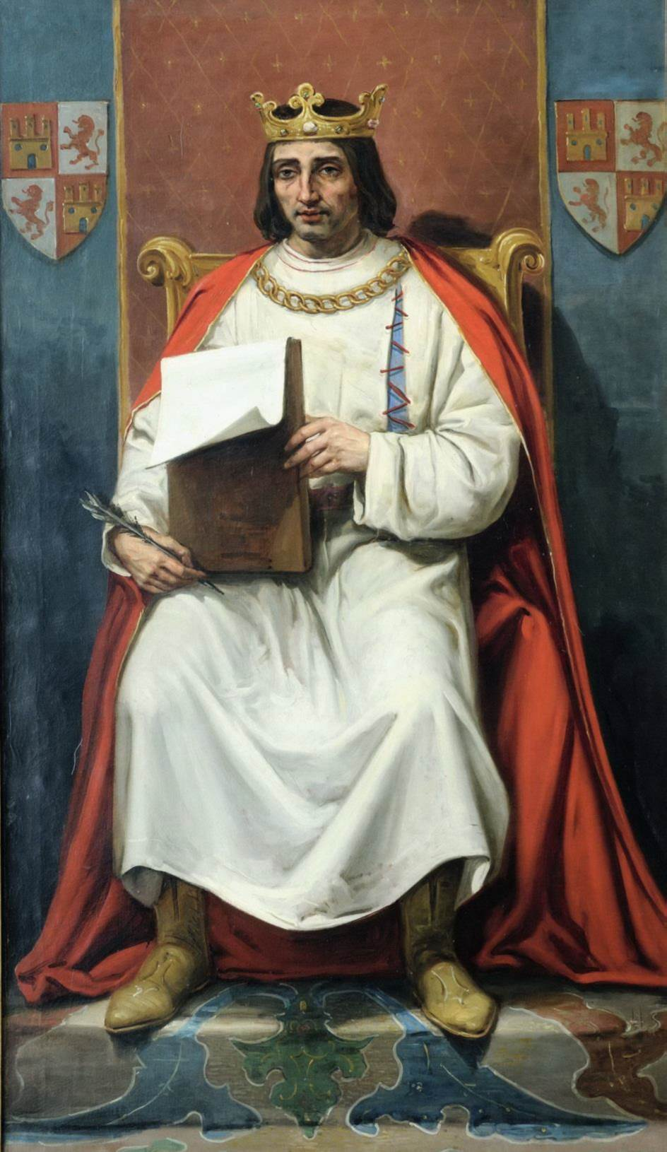 Retrato imaginario del rey Alfonso X de Castilla (1221-1284). Fue hijo del rey Fernando III de Castilla y de la reina Beatriz de Suabia. Reinó entre los años 1252 y 1284, en que falleció. A la muerte de su padre, Fernando III, reanudó la ofensiva contra los musulmanes, ocupando las ciudades de Jerez de la Frontera (1253) y Cádiz (c. 1262). En 1264 tuvo que hacer frente a una importante revuelta de los mudéjares de Murcia y el valle del Guadalquivir. Como hijo de Beatriz de Suabia, aspiró al trono del Sacro Imperio Romano Germánico, proyecto al que dedicó más de la mitad de su reinado sin obtener éxito alguno. Los últimos años de su reinado fueron especialmente sombríos, debido al conflicto sucesorio provocado por la muerte prematura de su hijo primogénito, el infante Fernando de la Cerda, y la minoridad de sus hijos, lo que desembocó en la rebelión abierta del infante Sancho, segundo hijo de Alfonso X, y de gran parte de la nobleza y las ciudades del reino. Alfonso X murió en Sevilla en 1284, durante el transcurso de esta revuelta, no sin antes haber desheredado a su hijo Sancho, que le sucedió en el trono. Alfonso X también es reconocido por la obra literaria, científica, histórica y jurídica realizada por su escritorio real. Alfonso X patrocinó, supervisó y a menudo participó con su propia escritura y en colaboración con un conjunto de intelectuales latinos, hebreos e islámicos, conocido como Escuela de Traductores de Toledo, en la composición de una ingente obra literaria que inició en buena medida la prosa en castellano.